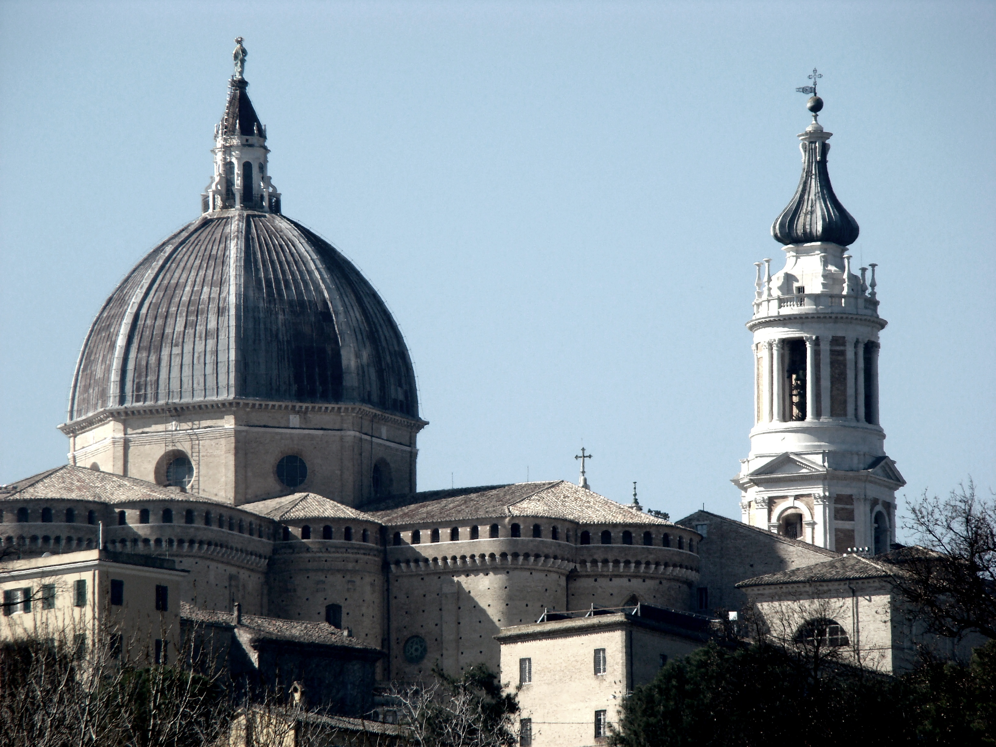 duomo della basilica e campanile